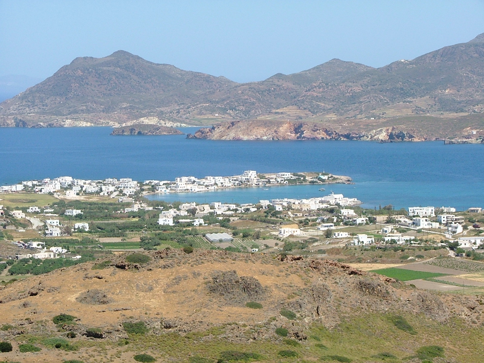 Πολλώνια